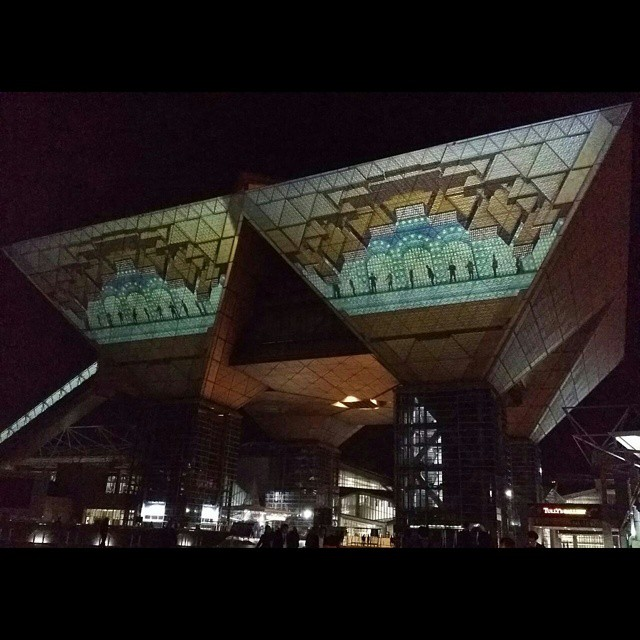 “2014楽器フェアを堪能して外に出たら、プロジェクションマッピングやってた。大きくて迫力があった。きれいだった。東京ビッグサイト。”